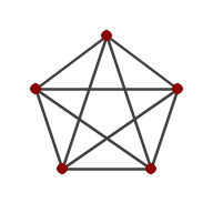 Representació de K5, exemple de graf no planar